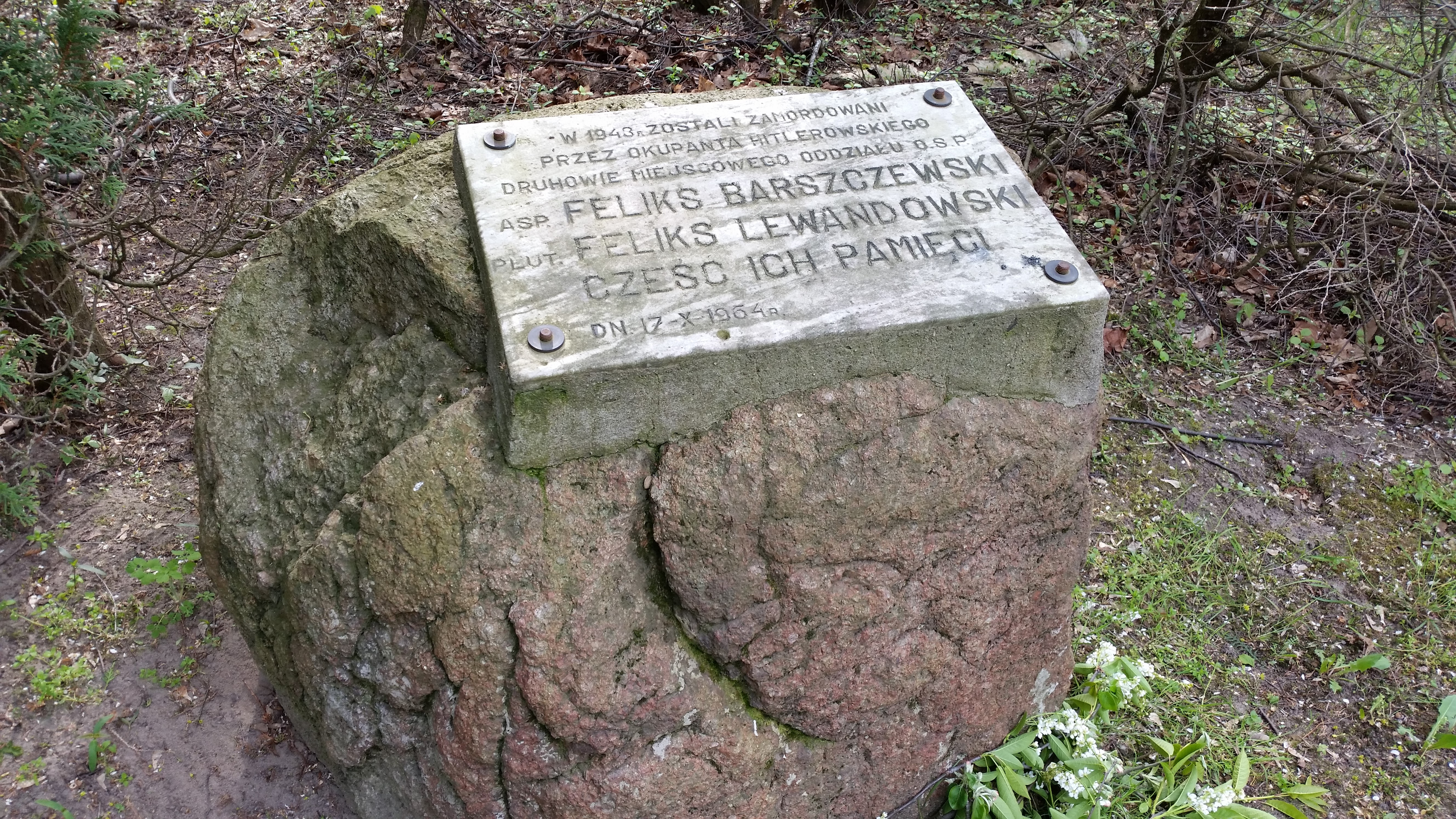 Tabliczka w miejscu upamiętnienia żołnierzy 28 Dywizji Piechoty i 2 Dywizji Piechoty Legionów Wojska Polskiego zmarłym z ran we wrześniu 1939 roku w szpitalu zakładu psychiatrycznego w Pruszkowie Tworkach